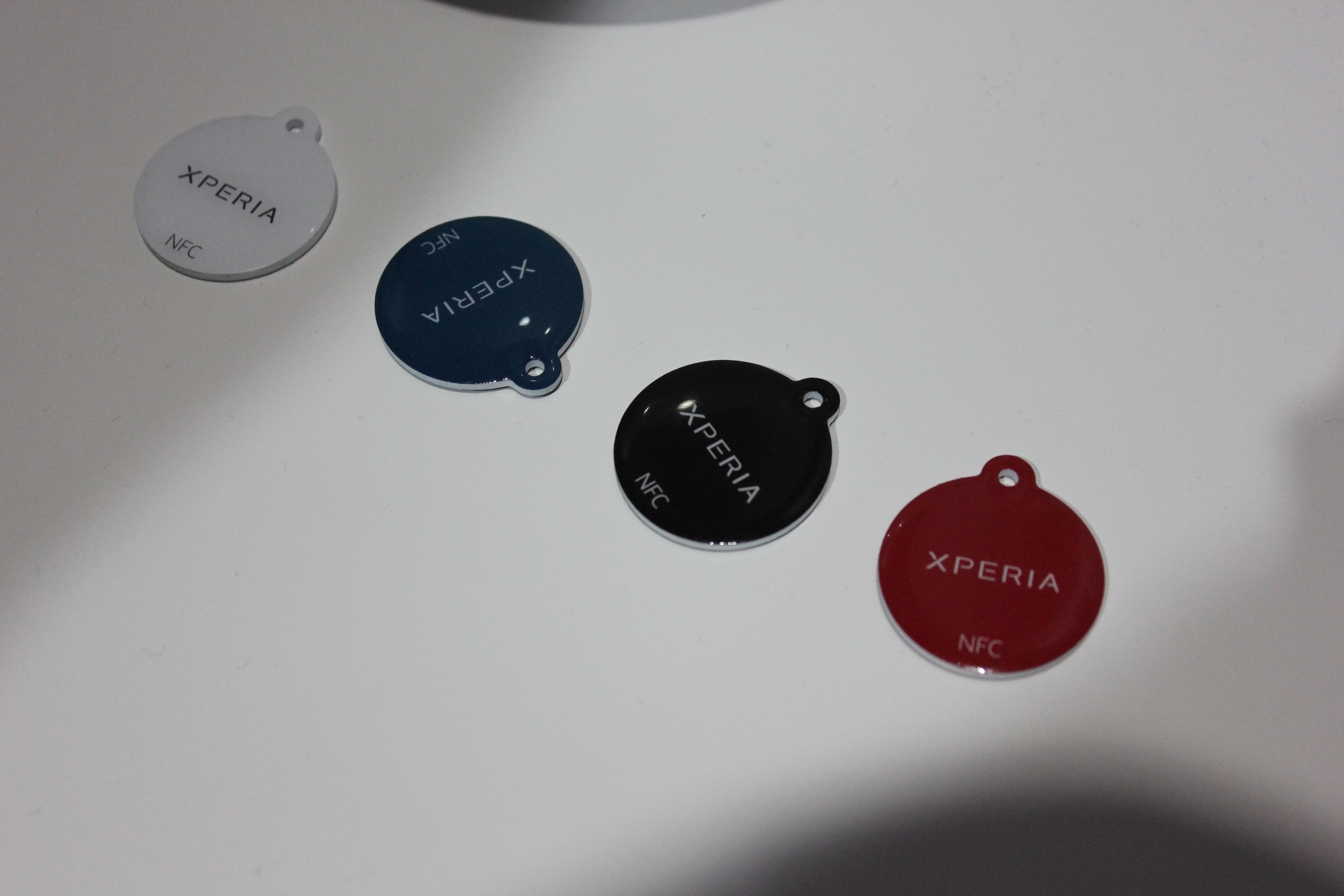 SmartTags para los dispositivos Sony Xperia